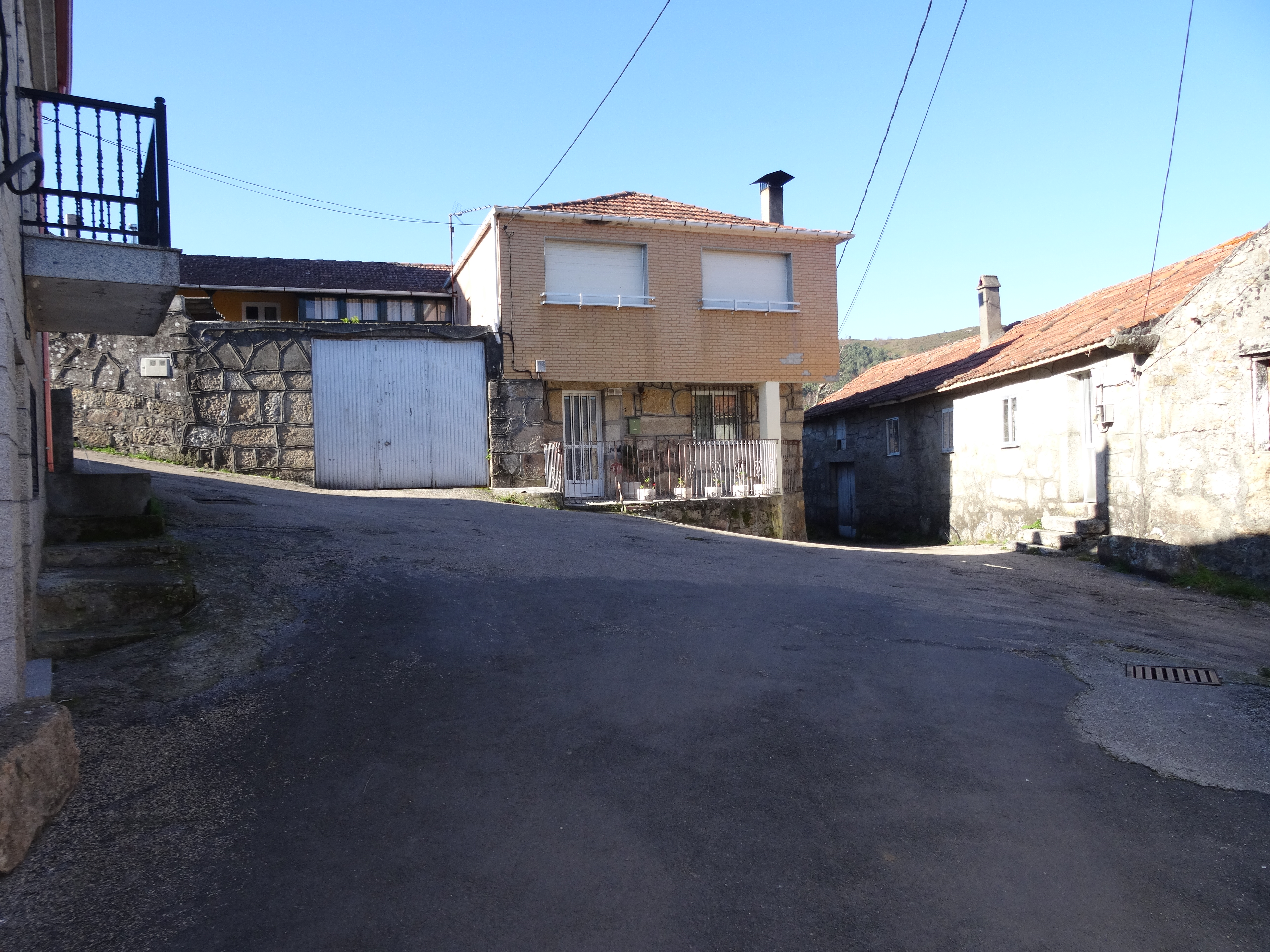 Ver título.